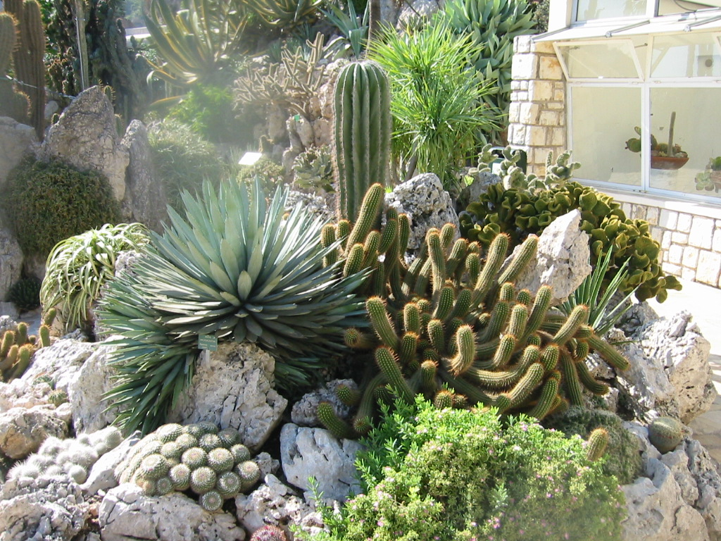 Cactuses at the Jardin Exotique de Monaco